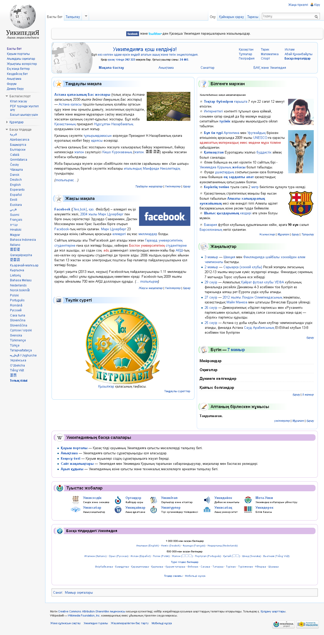 Česky: Screenshot - Hlavní strana Kazašské Wikipedie ze dne 7. května 2013